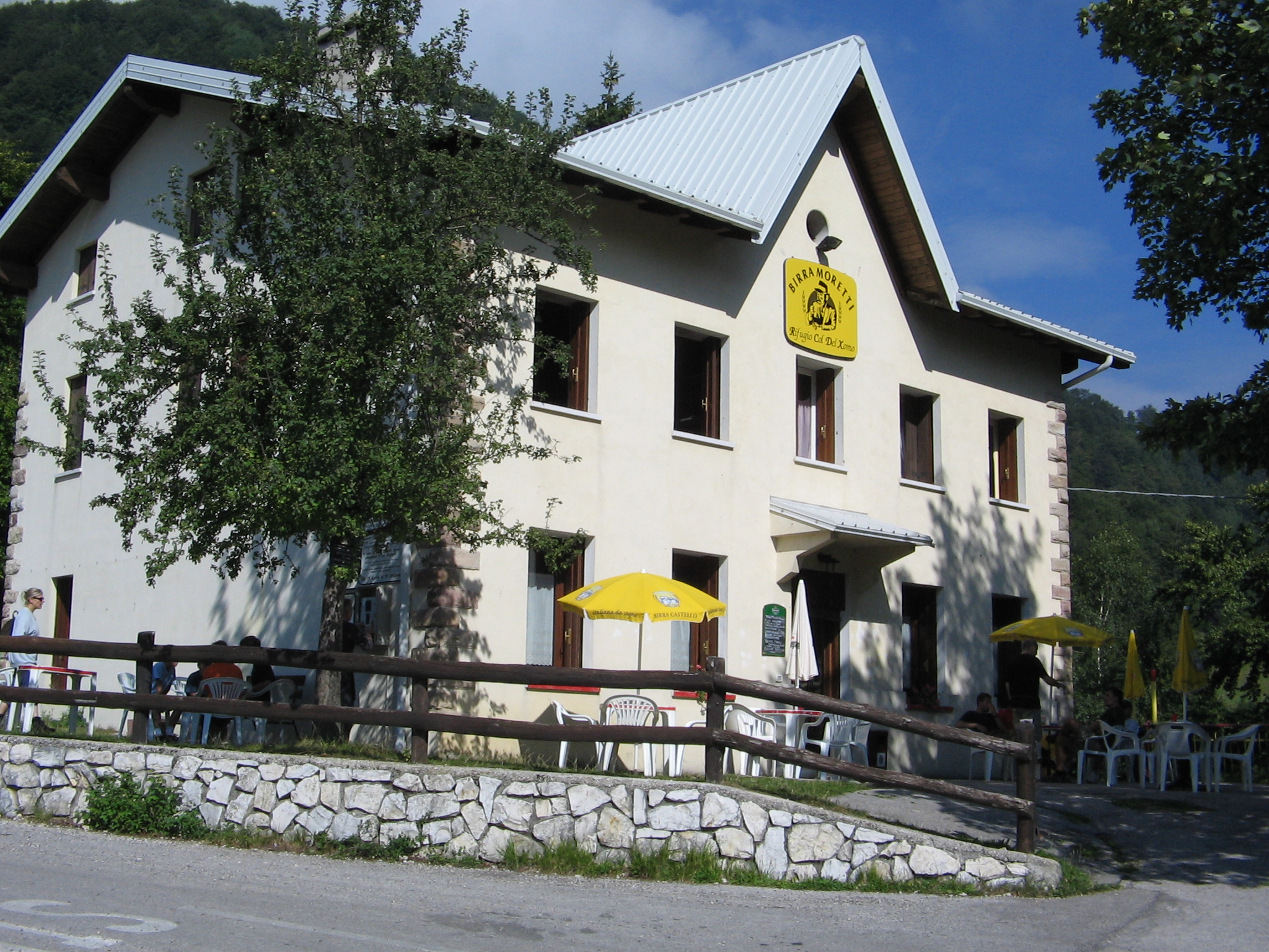 Rifugio Col del Xomo, Pasubio